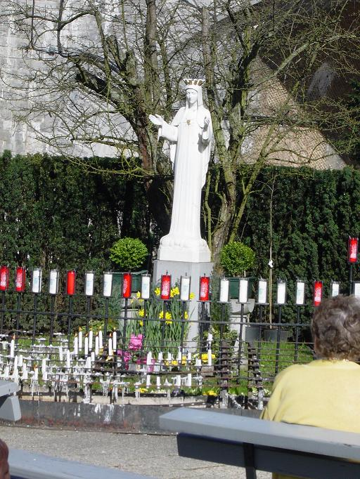 Notre dame au coeur d'or, Sanctuaire de Beauraing, Belgique